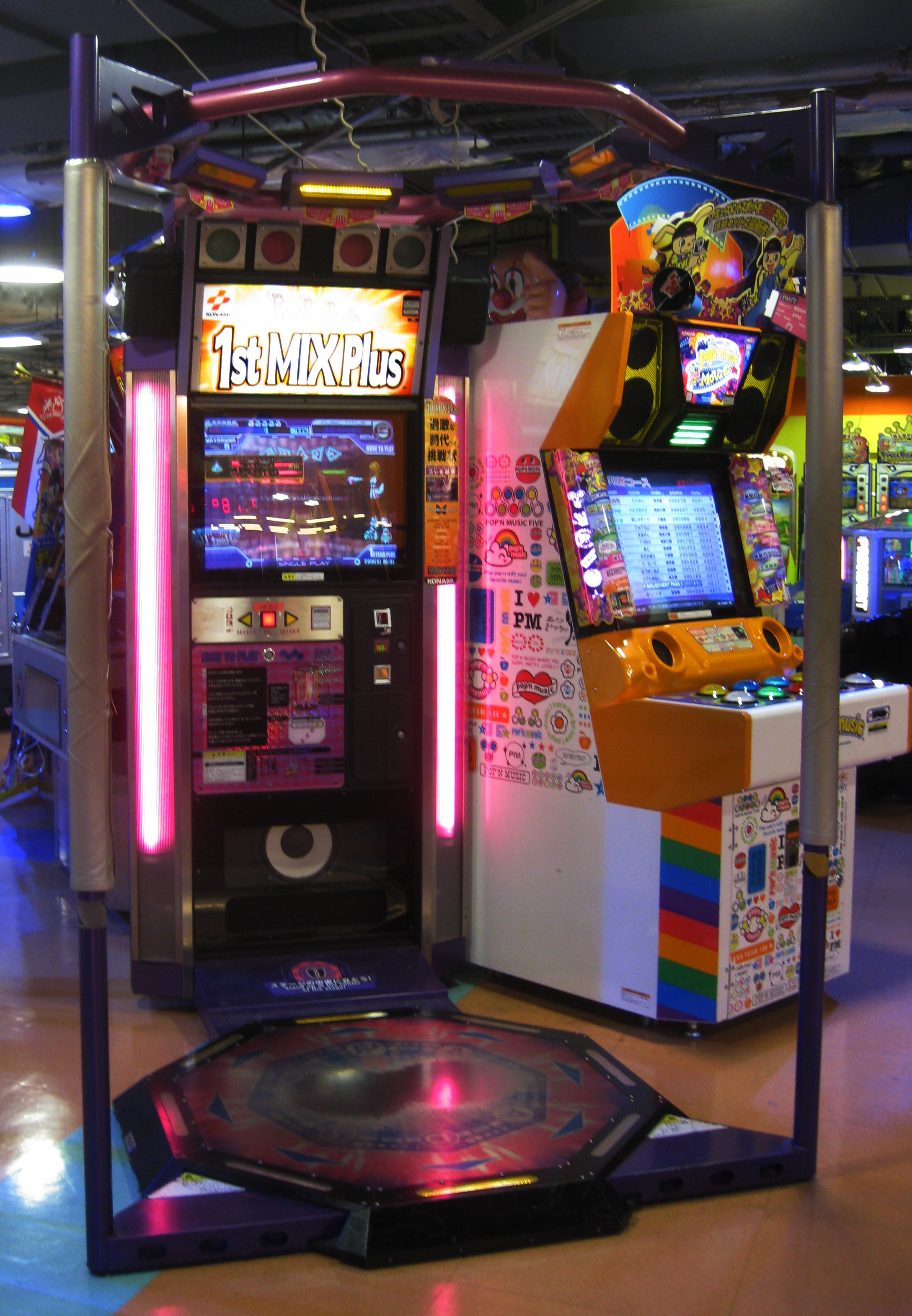 パラパラパラダイス筐体の参考写真